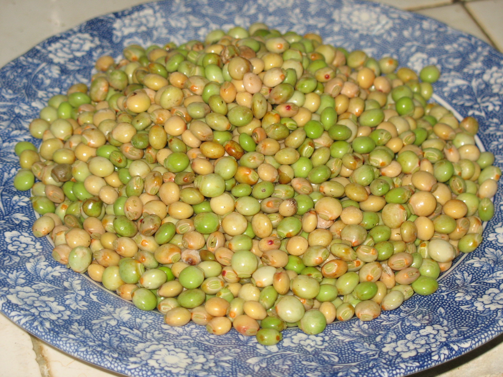 Guandules